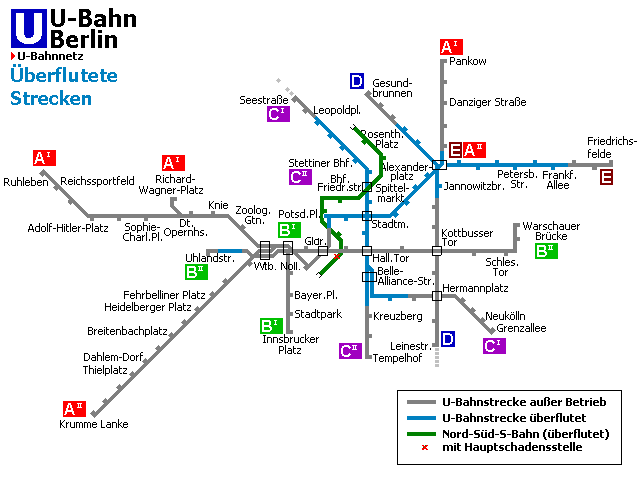 Überflutung der Berliner S- und U-Bahnschächte Ende April 1945